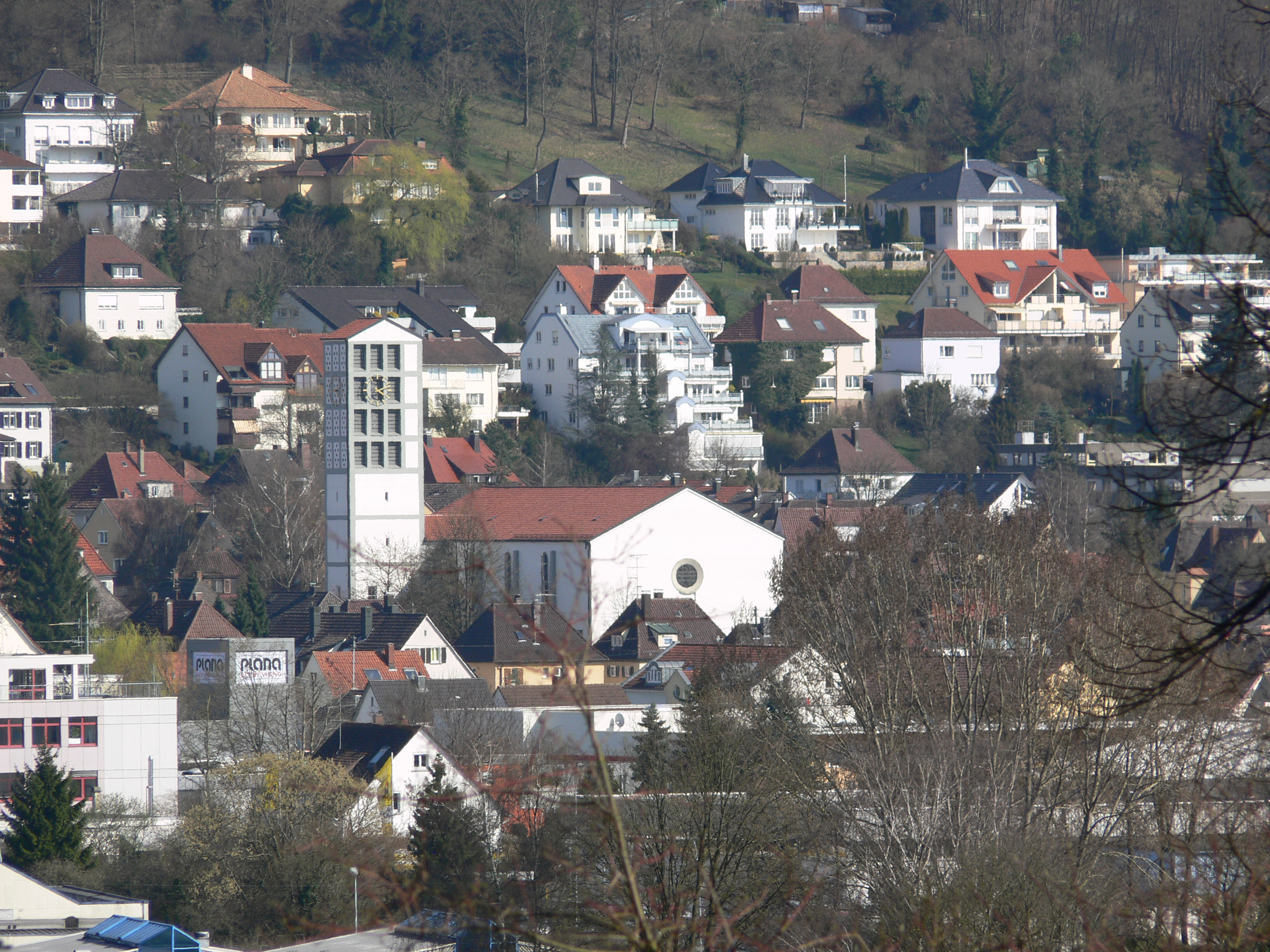 Ravensburg, Blick von der Galgenhalde auf die Christkönigskirche